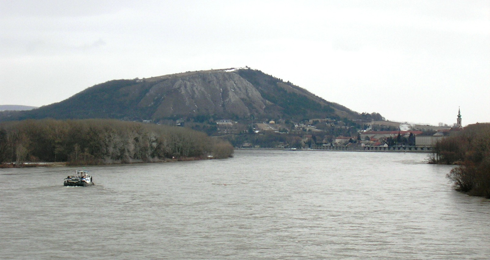 Braunsberg bei Hainburger Pforte